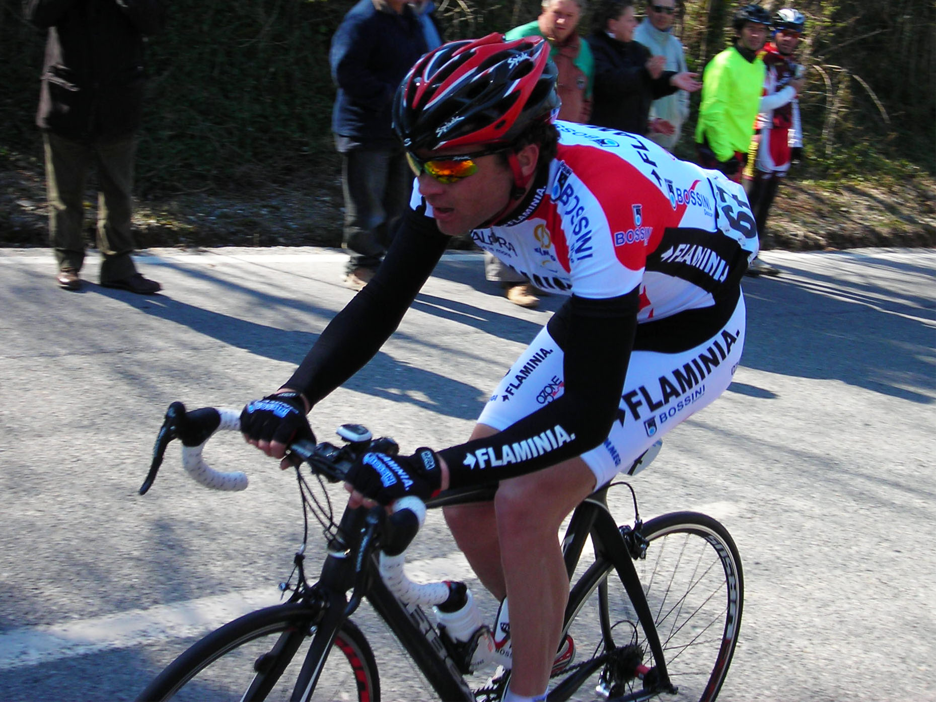 Alessandro Maserati sulle Manie alla Milano-Sanremo 2009